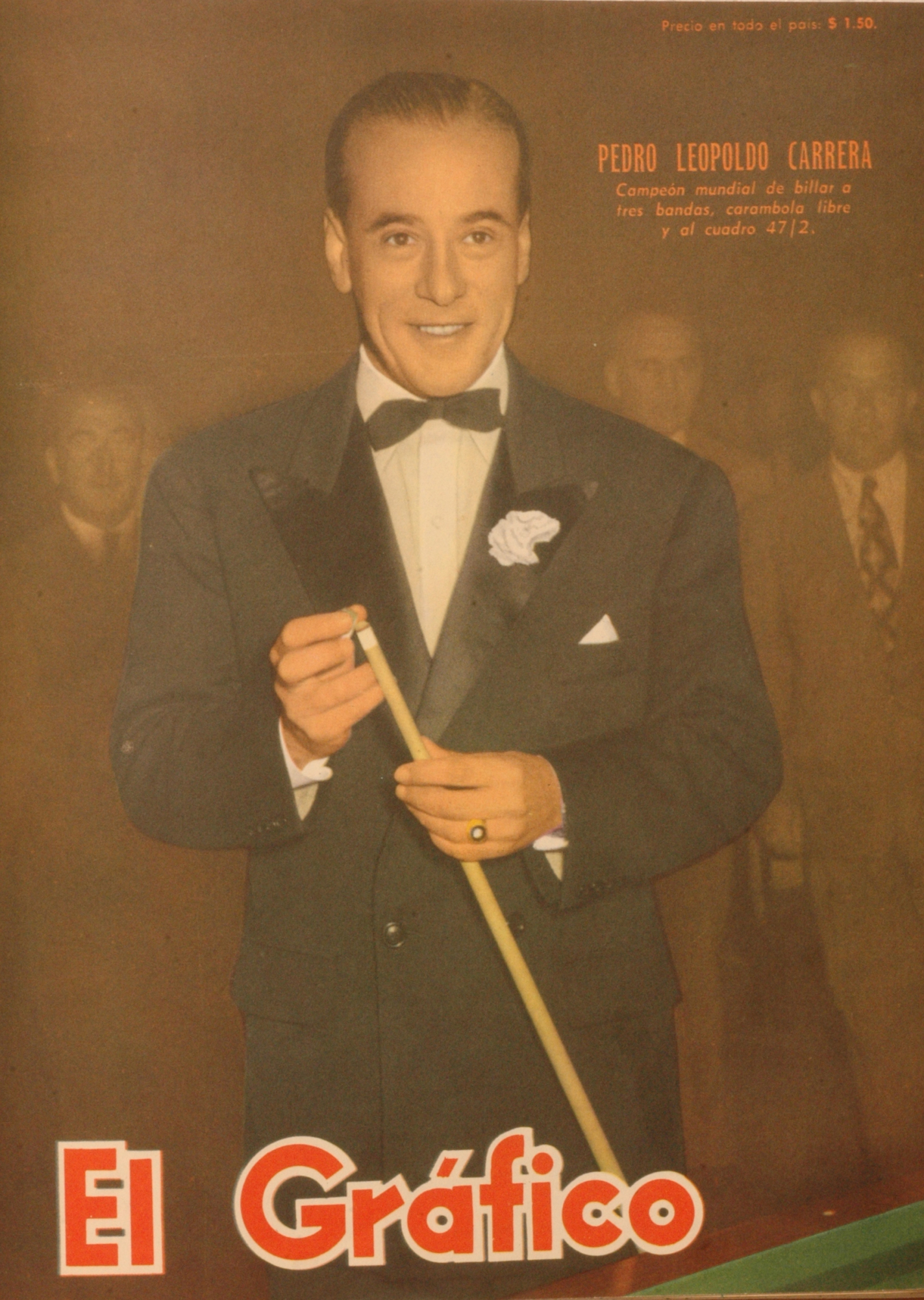 El Grafico del 28 de Noviembre de 1952. Edicion 1738